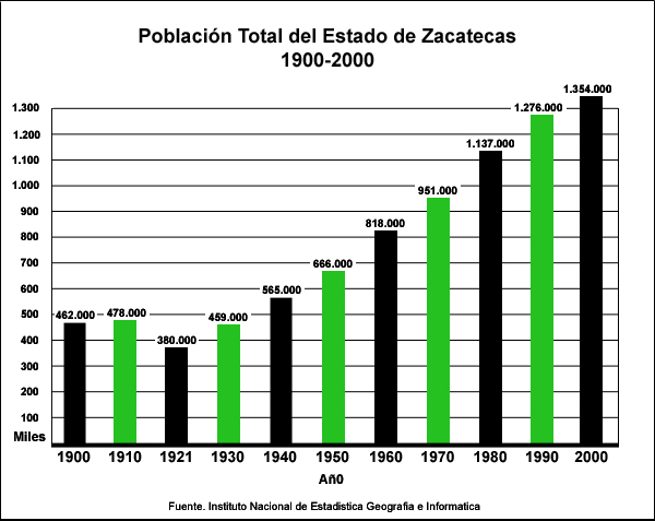 Población del Estado de Zacatecas, años 1900-2000.